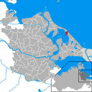 Loddin, Landkreis Ostvorpommern, Mecklenburg-Vorpommern